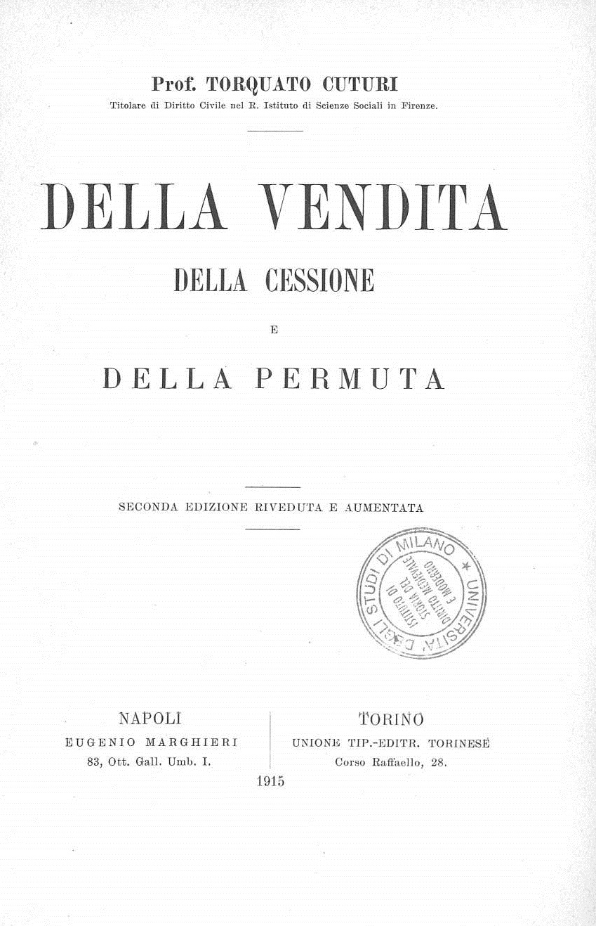 Frontespizio